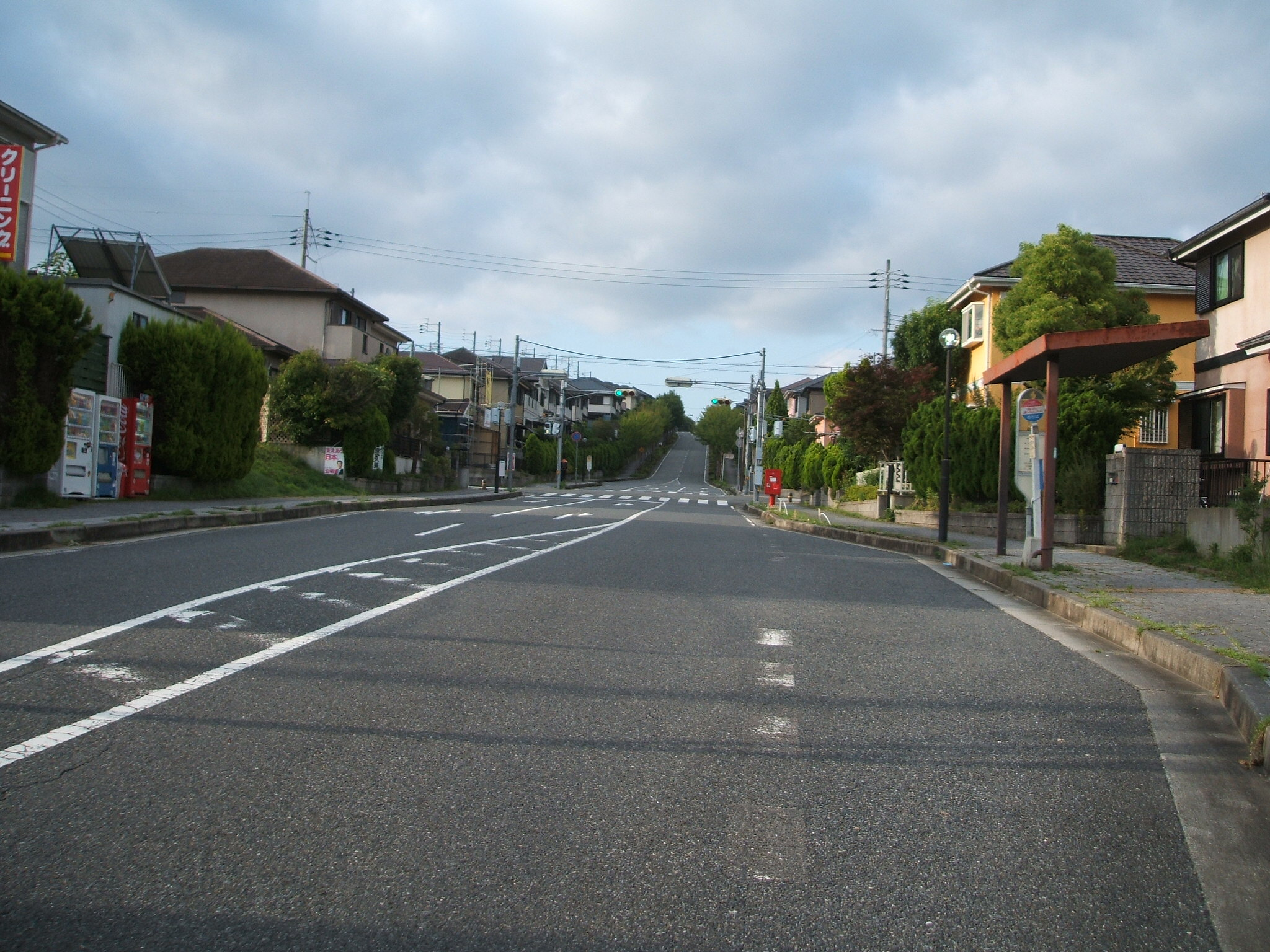 三木市吉川町みなぎ台１丁目町並み